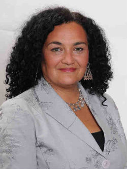 Clemira Pacheco Rivas